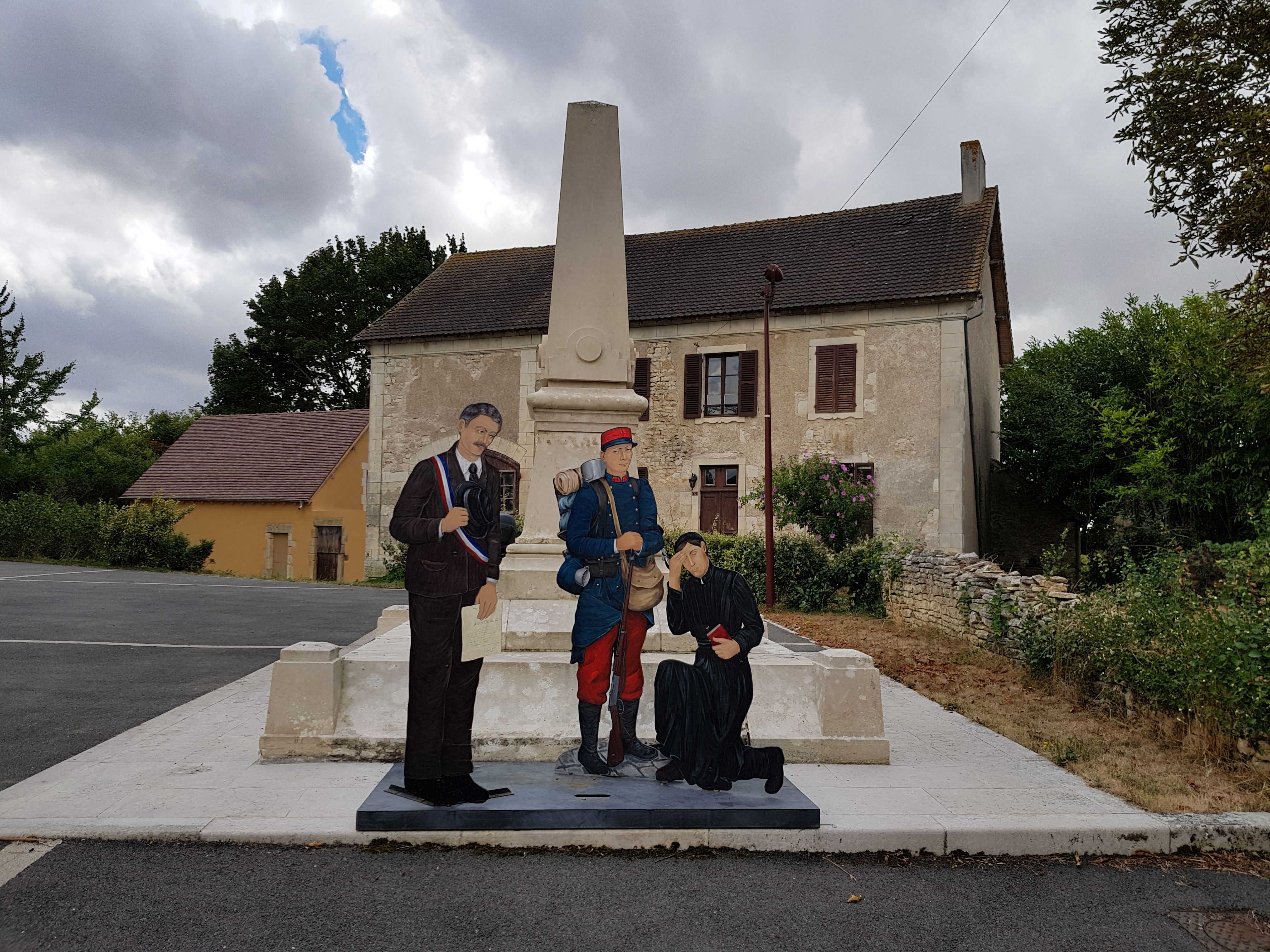 Monument aux morts de Suilly-la-Tour, Nièvre.